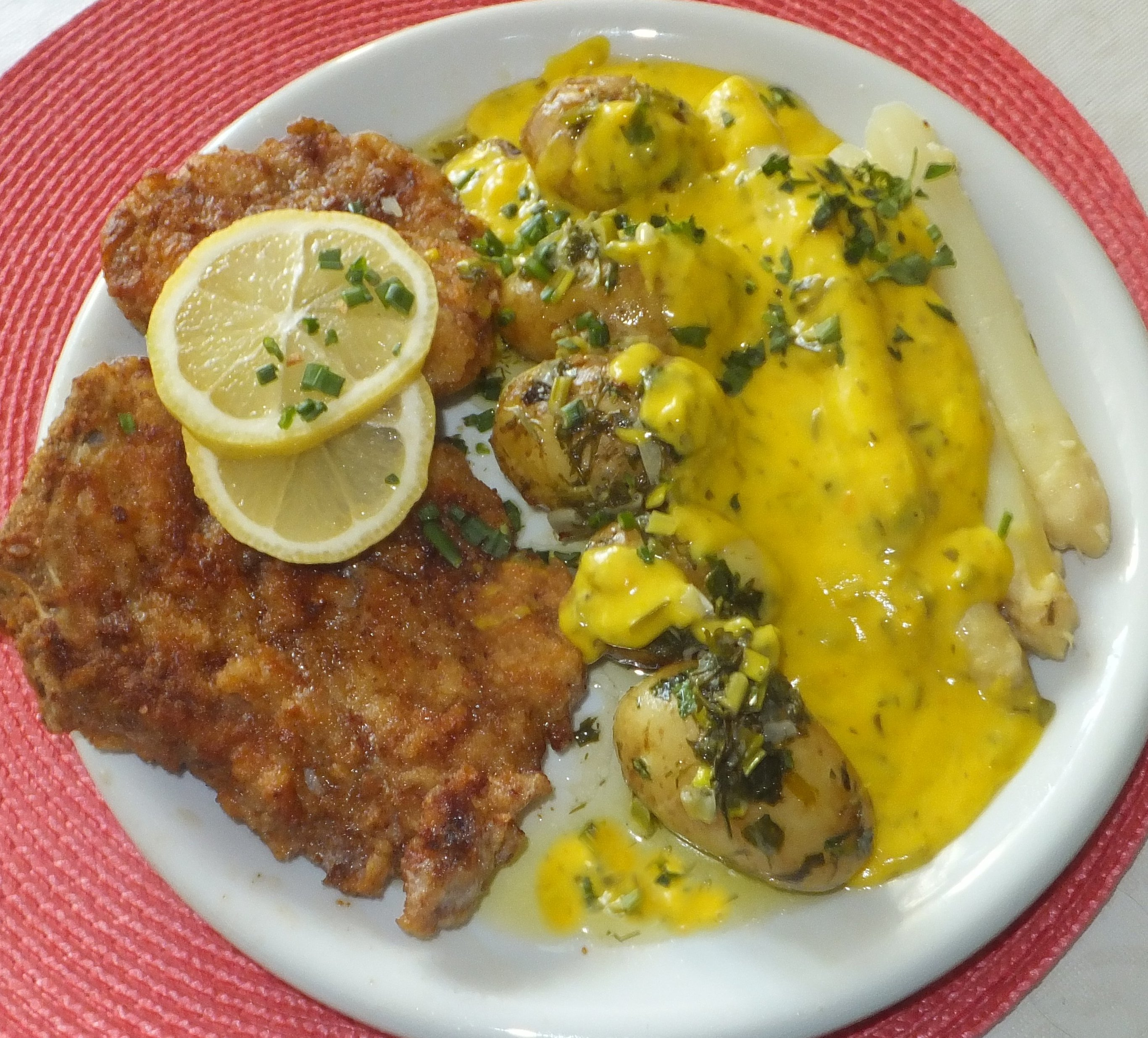 Kalbsschnitzelvariation, junge Kräuter-Backofen-Kartoffeln, Spargel und Sc. Béarnaise